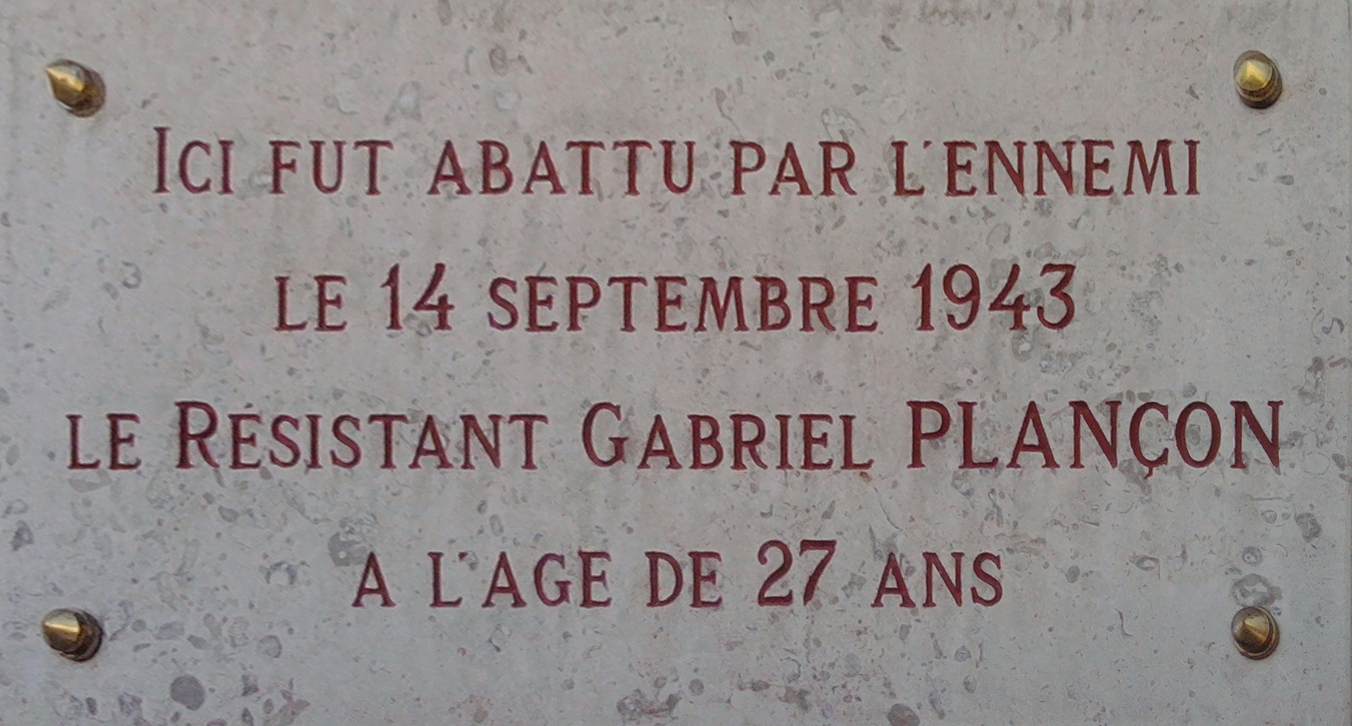 Plaque commémorative du Résistant Gabriel Plançon (1916-1943) place George Risler à Besançon.